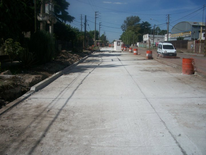 Repavimentacion ruta21 en frente del cementerio de santa monica Libertad, Merlo, Buenos Aires, Argentina